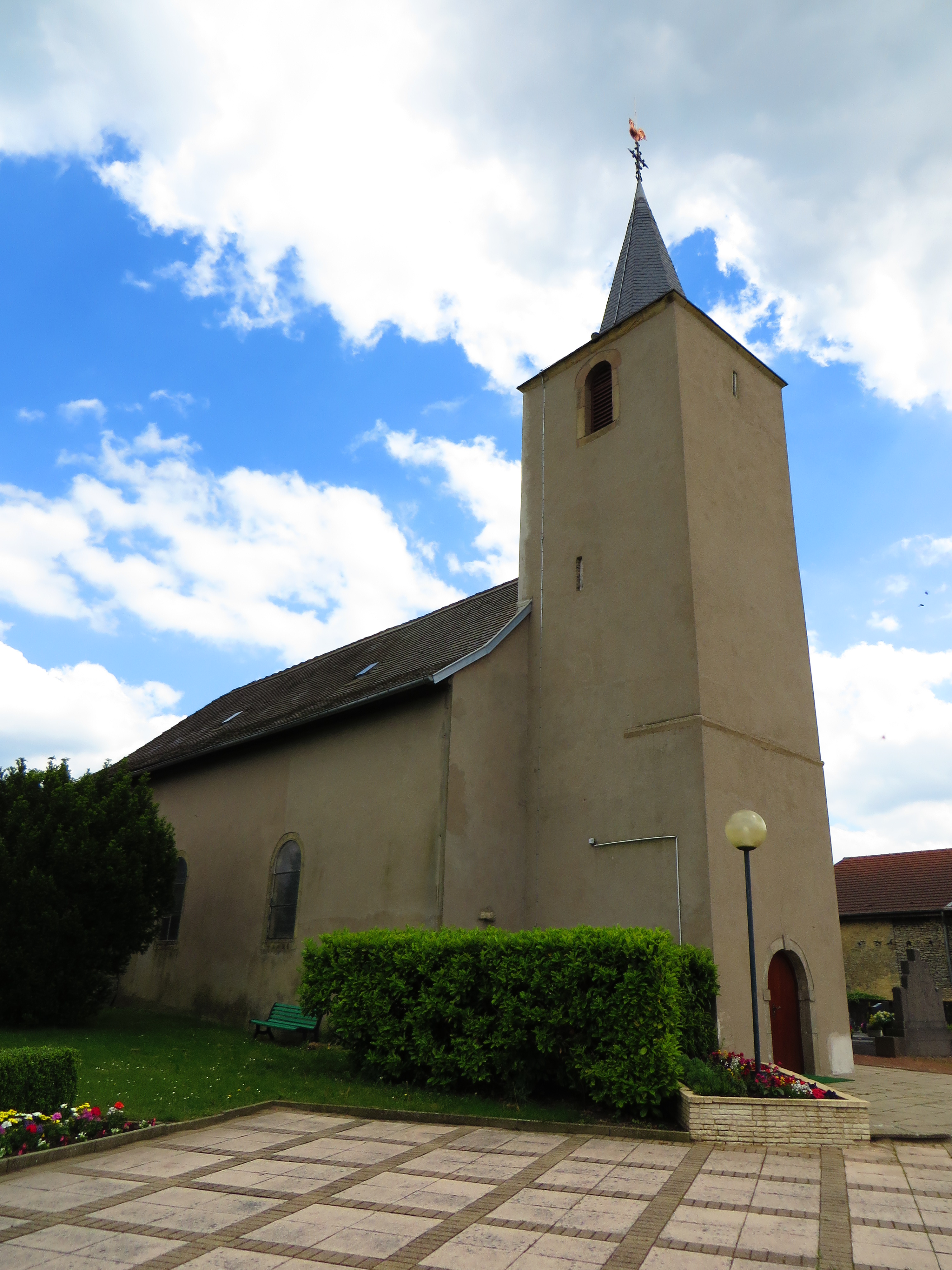 Dorviller eglise